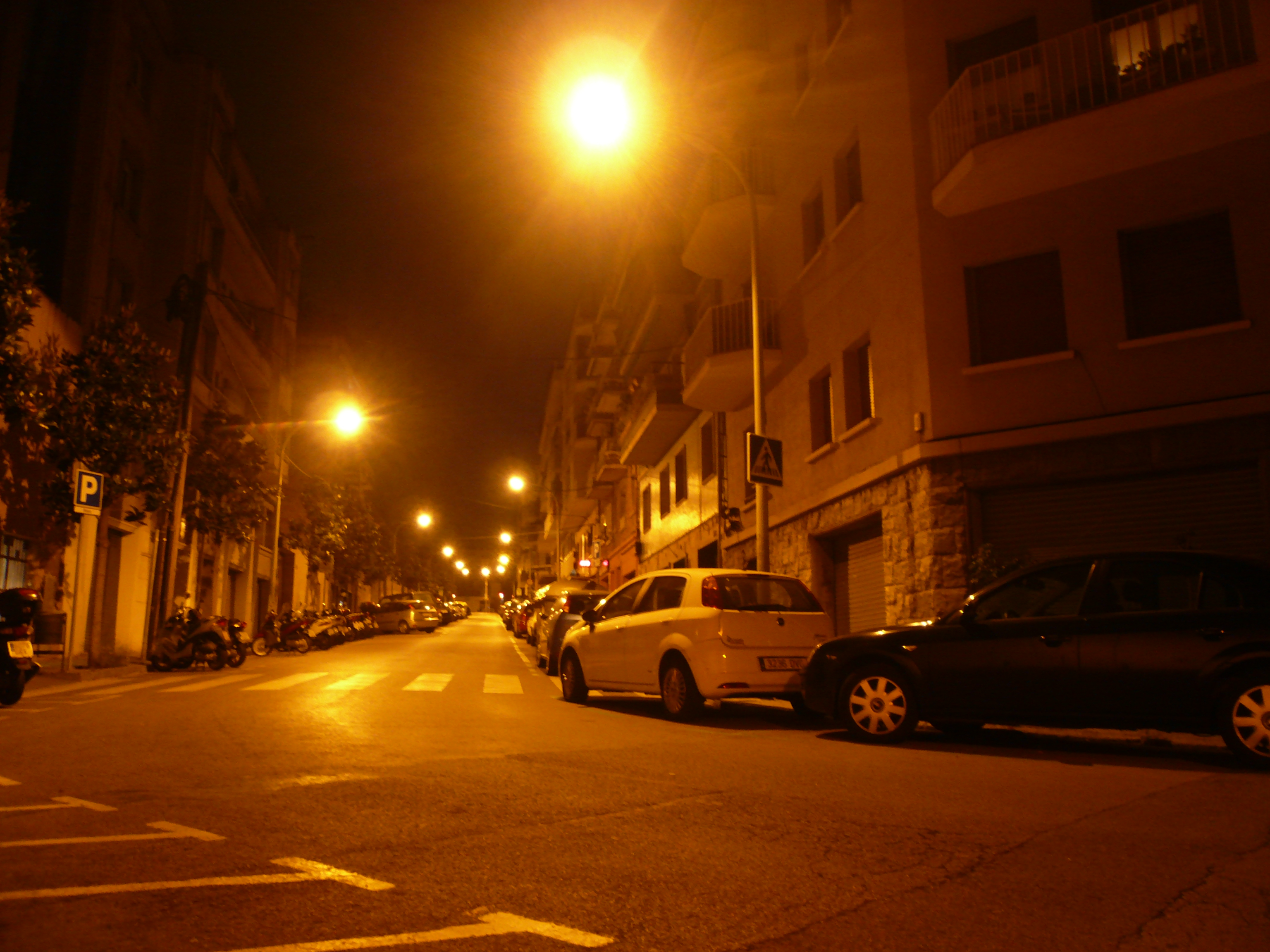 Carrer de Rafael Batlle, a Sarrià, obviament de nit. La foto està feta deixant la càmera sobre una paperera a la cantonada amb el carrer Rosari i apuntant en direcció muntanya.